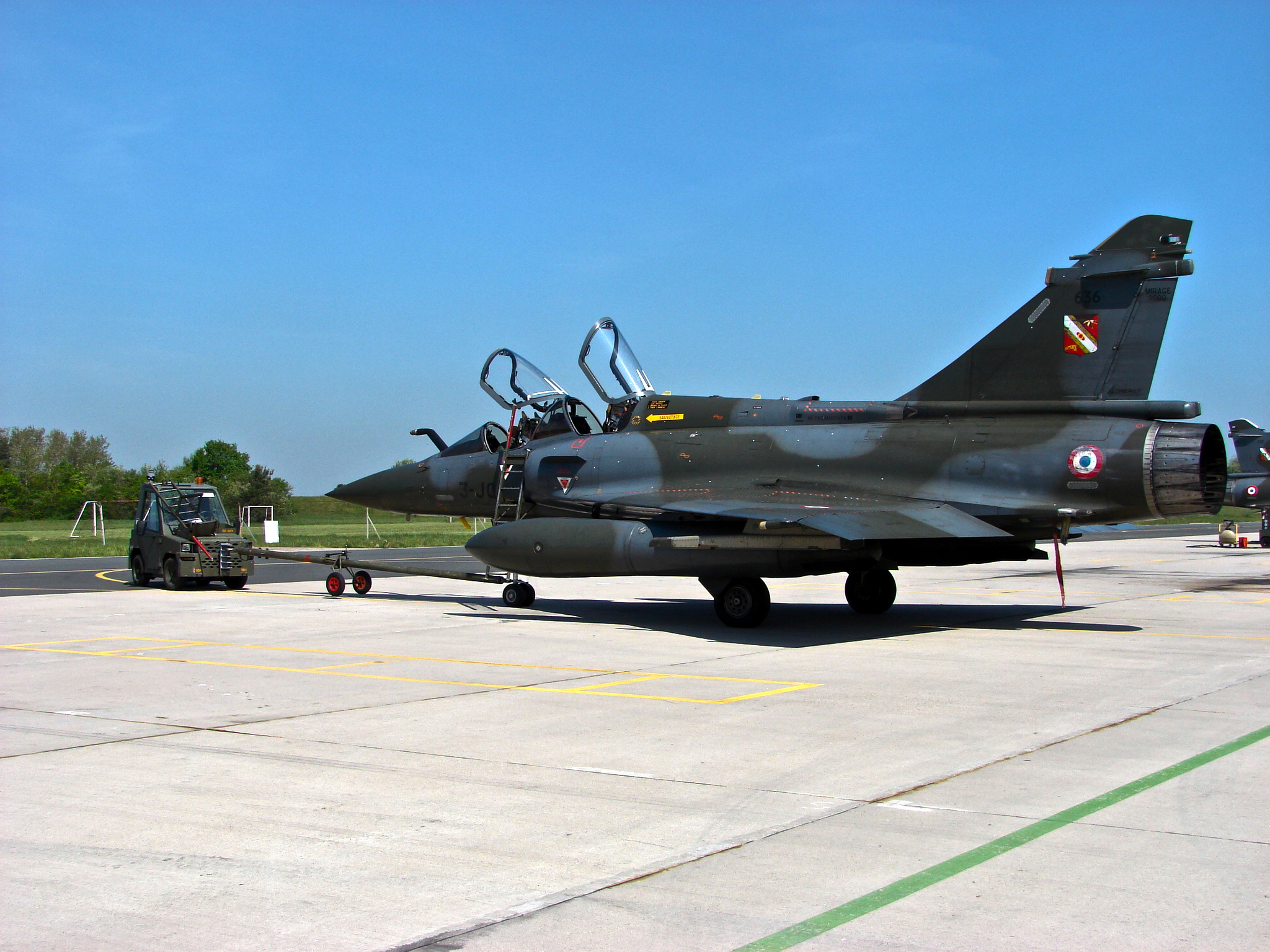 Dassault Mirage 2000D